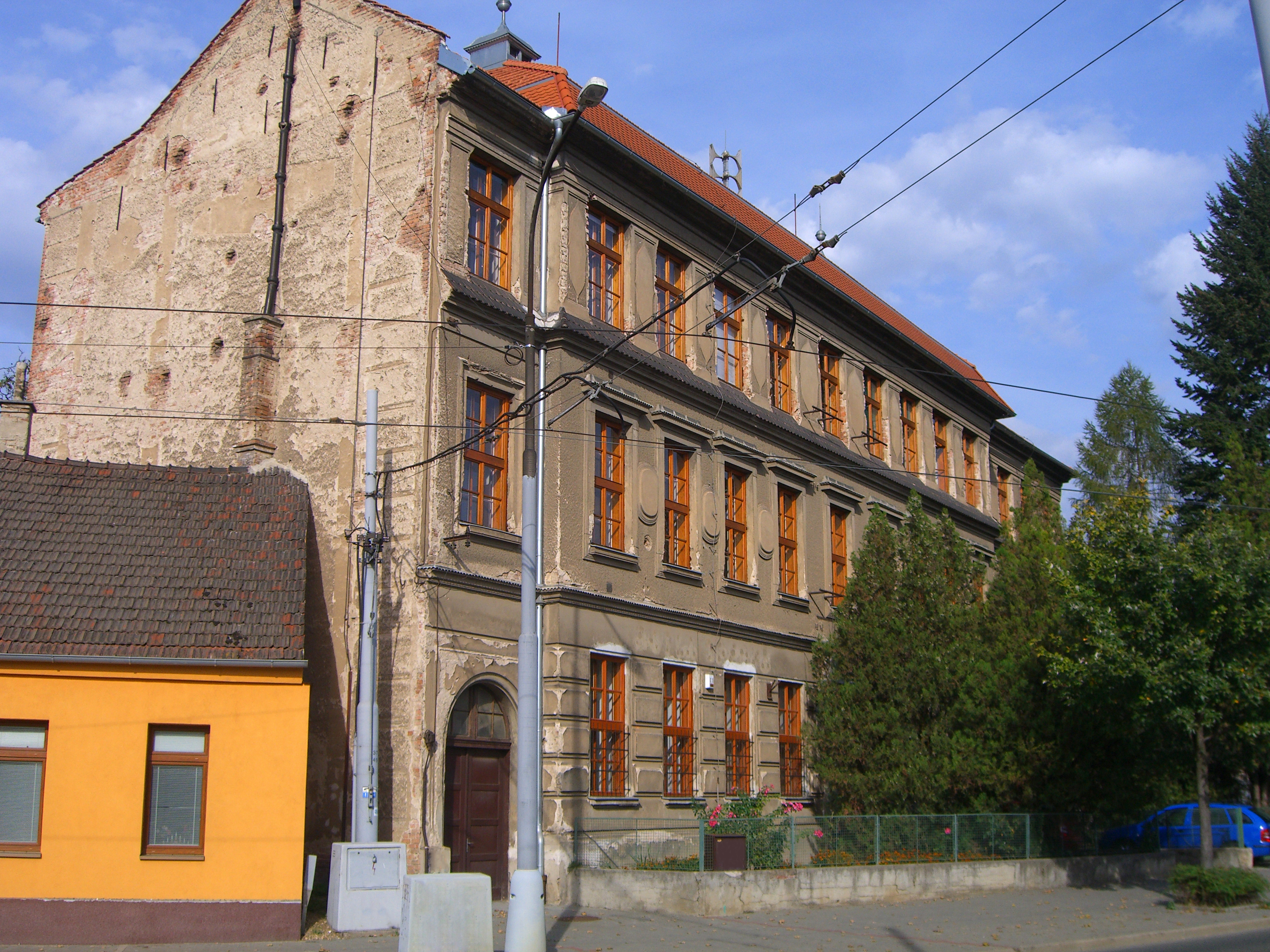 Bývalá budova vyšší odborné školy restaurátorské, součásti Střední školy umění a designu a Vyšší odborné školy restaurátorské v Brně